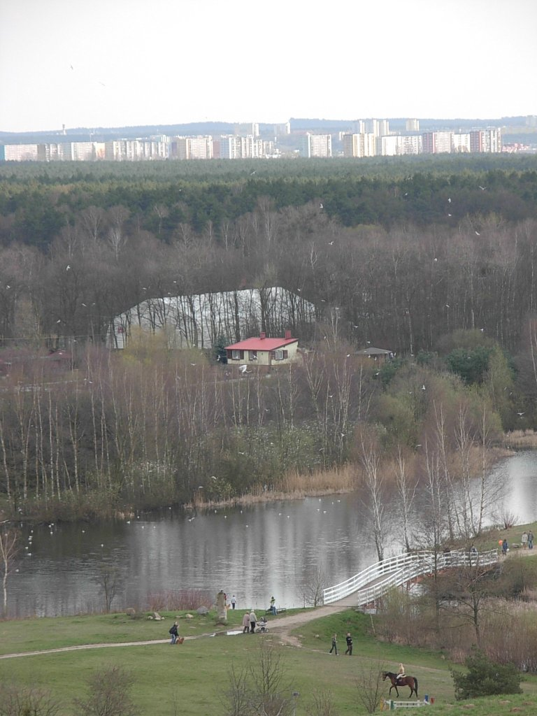 Wczesna wiosna w Myślęcinku